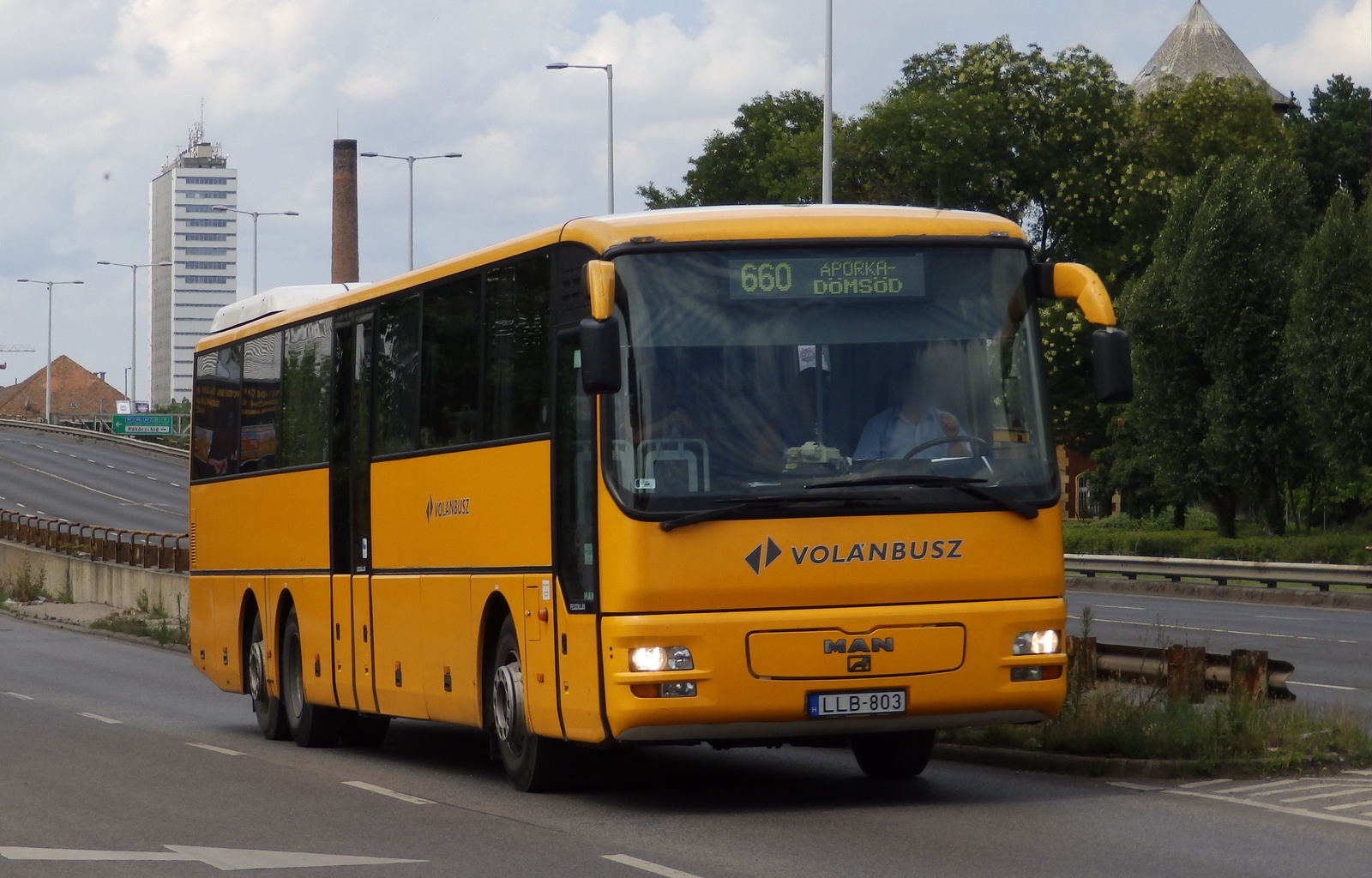 MAN ÜL 363-as autóbusz a 660-as vonalon.